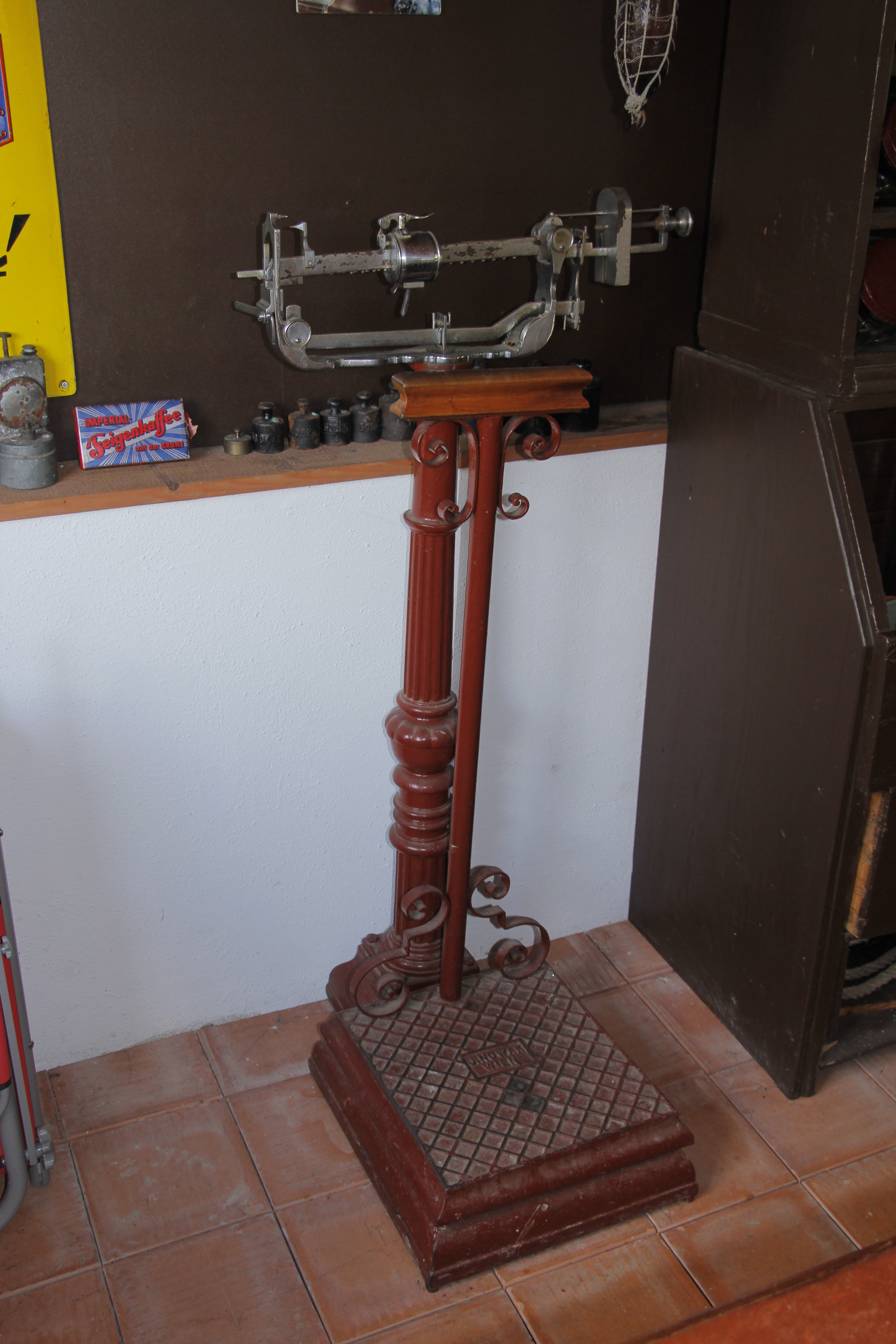 Museumsdorf in Krumbach in der Buckligen Welt, NÖ Dieses Bild wurde anlässlich des österreichischen Tags des Denkmals 2015 in Niederösterreich eingereicht.